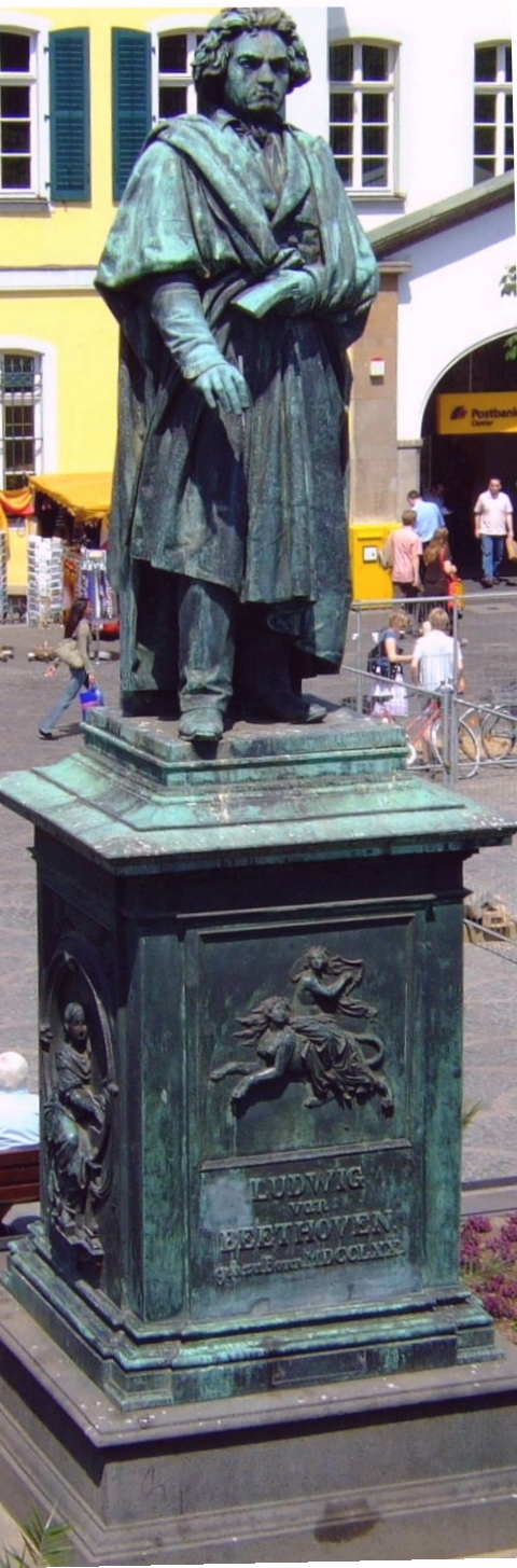 Beethoven-Denkmal von Ernst Hähnel und Jacob Daniel Burgschmiet auf dem Münsterplatz in Bonn